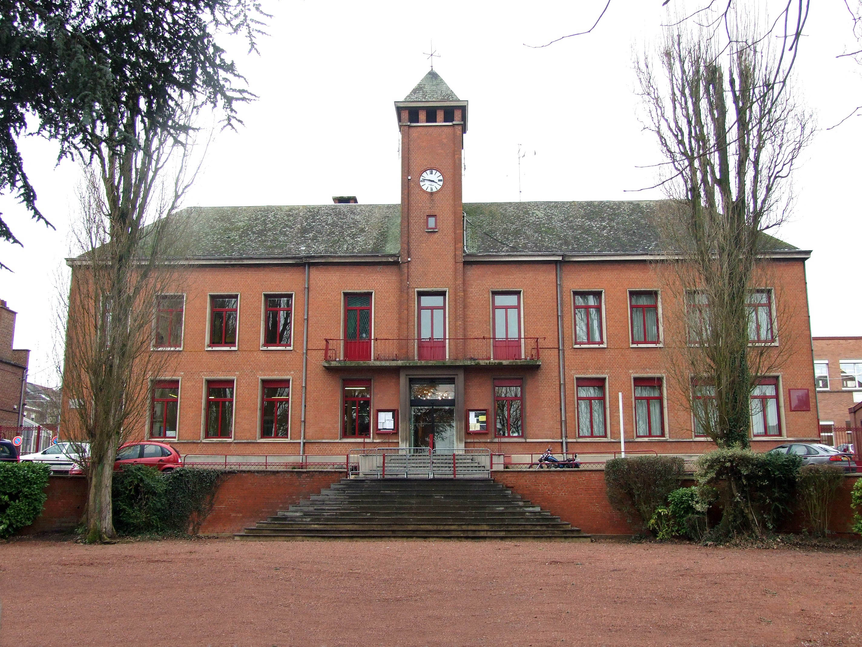 Mairie de Trith-Saint-Léger